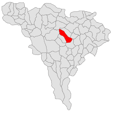 Categorie:Hărţi ale judeţului Alba